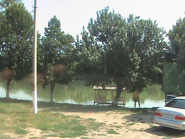 Став в центрі села: фото